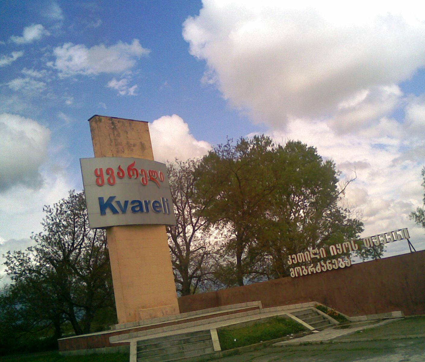 ყვარლის მუნიციპალიტეტის შესასვლელი